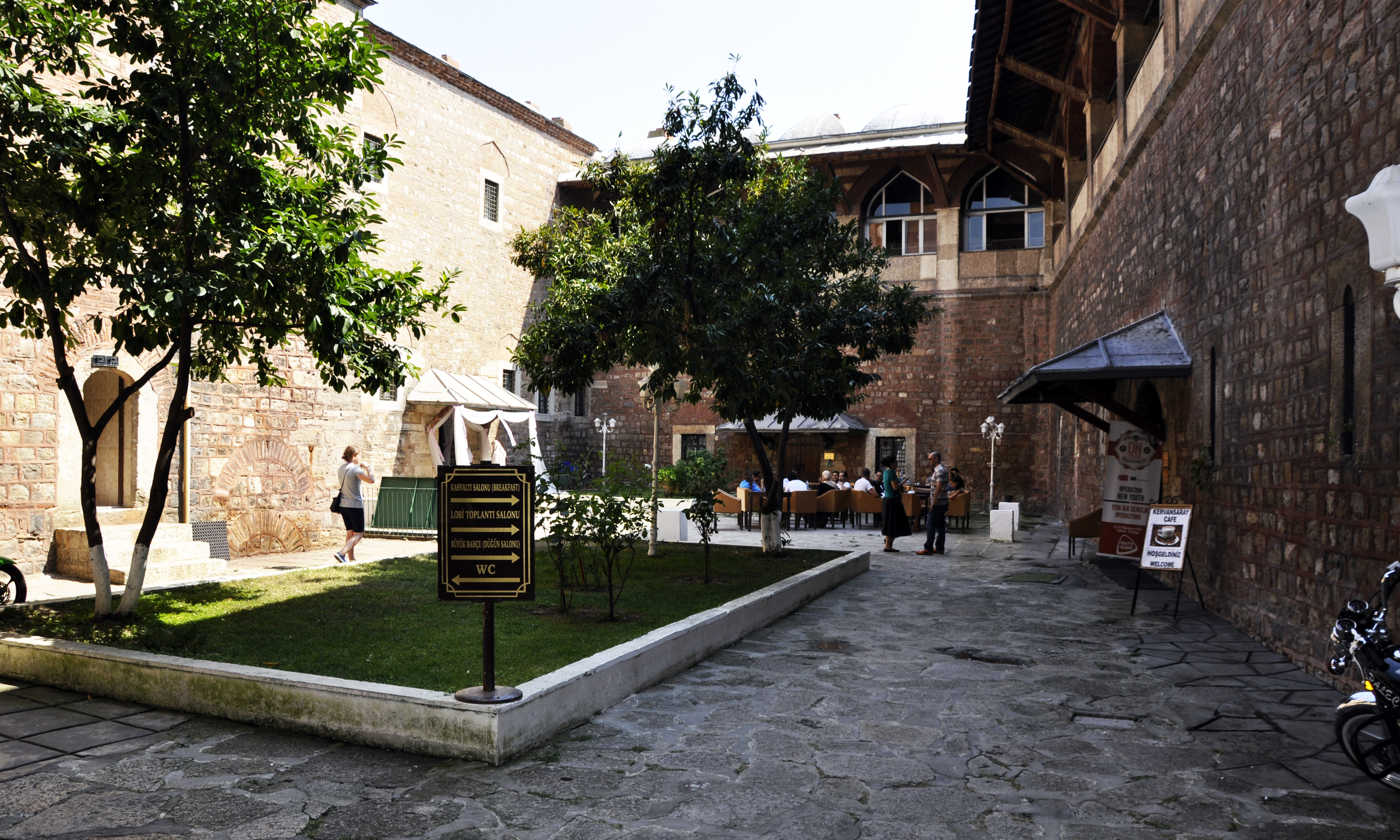 Kervansaray Hotel